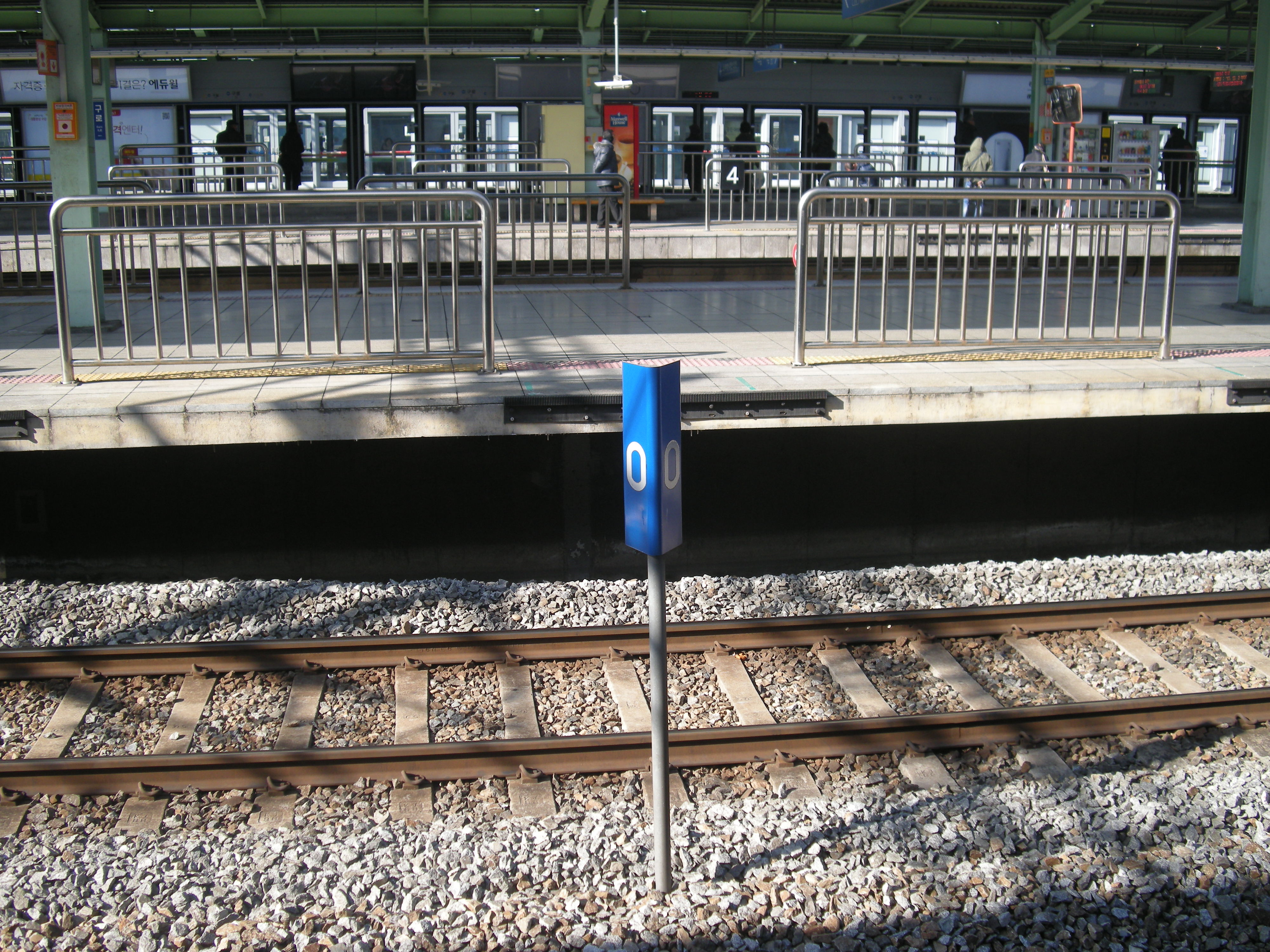 구로역 경인선 0km 거리표지